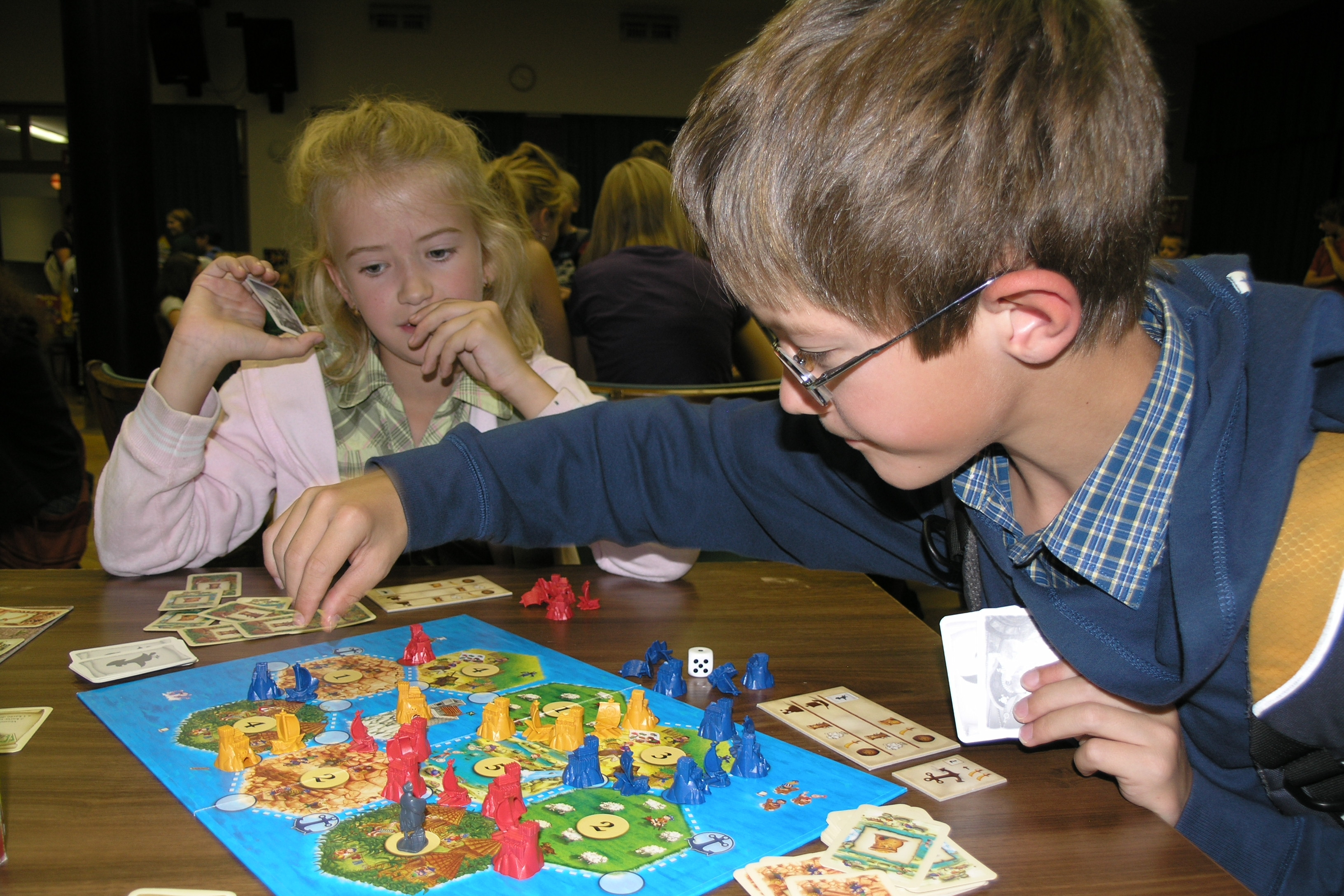 Hry a hlavolamy 2008 - festival her a hlavolamů v Praze, Holešovicích